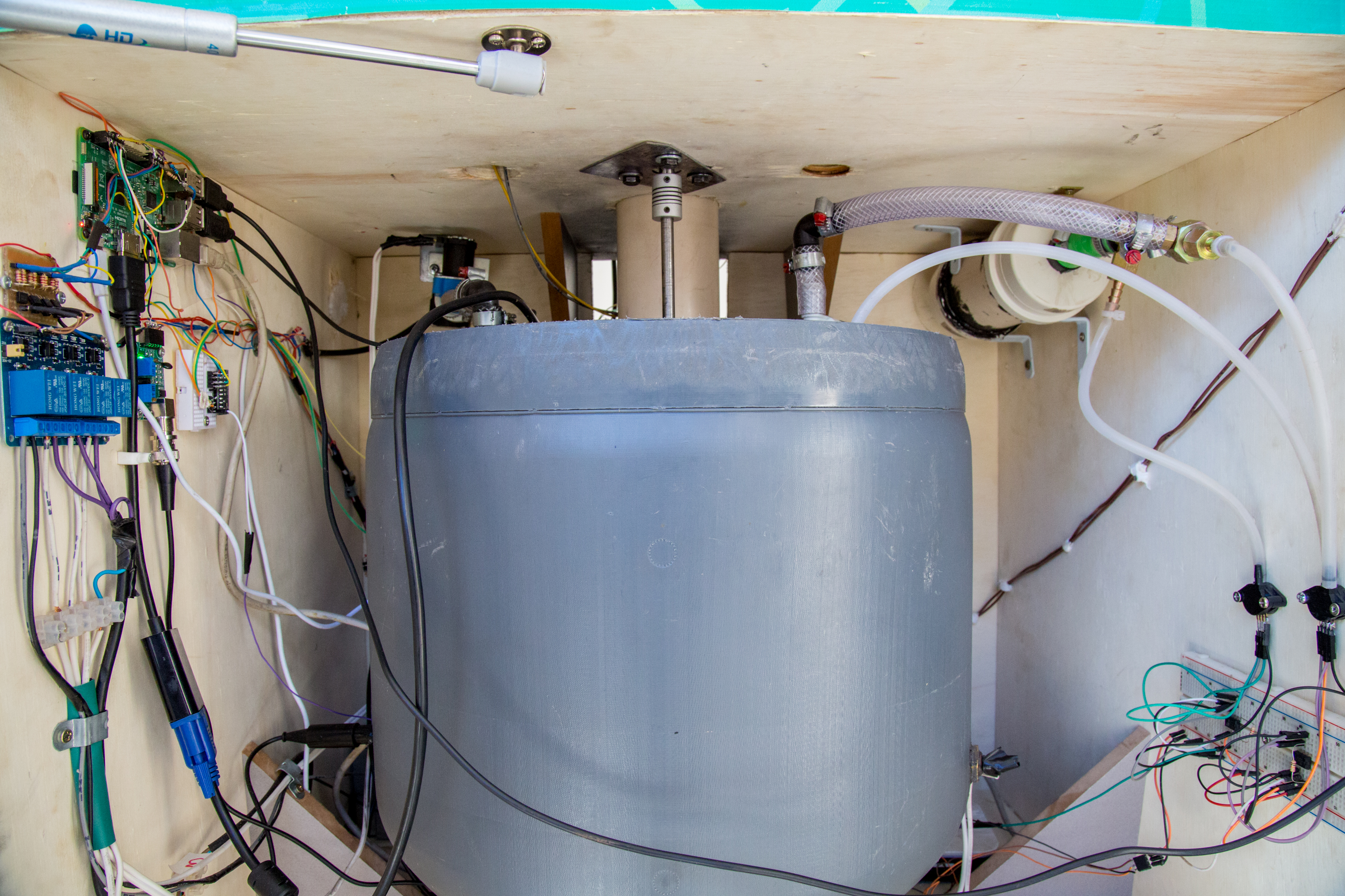 Brasília, 05 de Julho de 2018. O evento faz parte das comemorações pelos 10 anos da Faculdade do Gama. A I Feira de Inovação e de Tecnologia (FIT) apresentou os produtos e protótipos de engenharia concebidos pelos alunos dos cursos de engenharia da FGA como forma a tornar público as inovações criadas nas disciplinas de Projeto Integrador 1 e 2. A realização do evento contemplou a exposição de outros projetos e produtos criados nas atividades de extensão. Foram apresentados os projetos Kart-FGA, Projeto Demoiselle e as equipes de competição: Baja e Mamutes. O evento contou com Campeonato de Aeroplanadores com equipes de competição de alunos do curso de engenharia aeroespacial. A disciplina Projeto Integrador de Engenharia 2, da FGA-UnB, proporciona aos alunos das cinco engenharias do campus (aeroespacial, automotiva, energia, eletrônica, software) a possibilidade de desenvolver produtos que integrem os conhecimentos. Na foto, o projeto Biodigestor automatizado PH7. Confira a matéria completa no portal da UnB: Foto: Beto Monteiro / Secom UnB. ATENÇÃO – As informações, as fotos e os textos podem ser usados e reproduzidos, integral ou parcialmente, desde que a fonte seja devidamente citada e que não haja alteração de sentido em seus conteúdos. Crédito para textos: nome do repórter/Secom UnB ou Secom UnB. Crédito para fotos: nome do fotógrafo/Secom UnB.